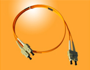 LWL-Kabel Duplex Multimode (SC/SC)